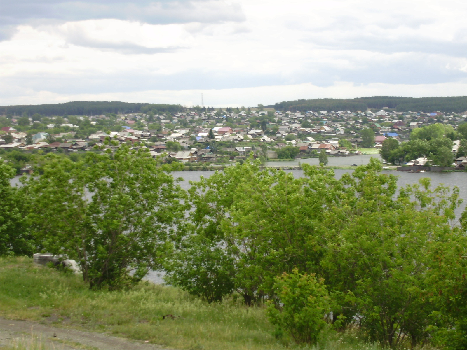 г.Реж, Свердловская область